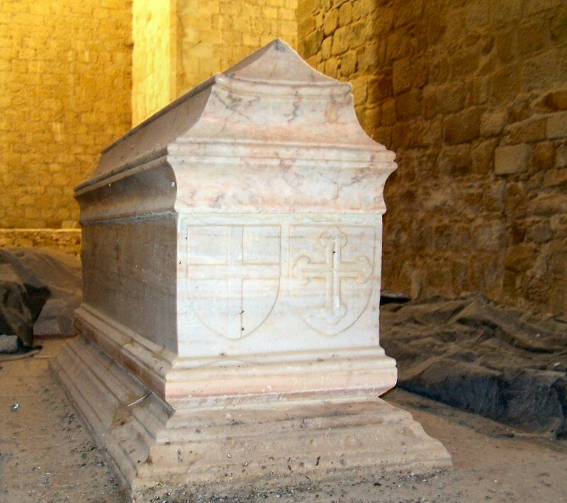 Túmulo de D. Álvaro Gonçalves Pereira, em Flor da Rosa.